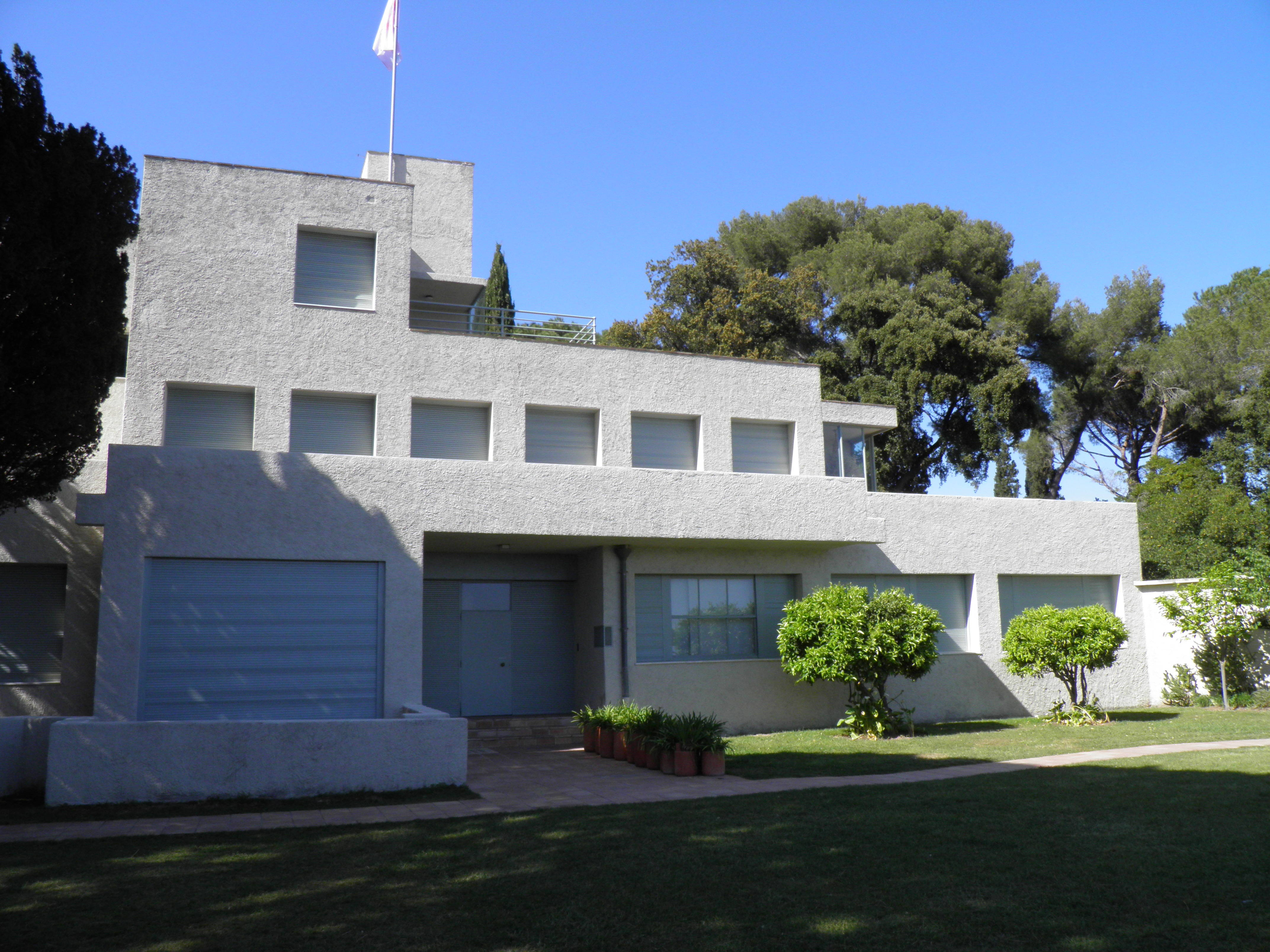 Villa Noaills à Hyères (Var, France).